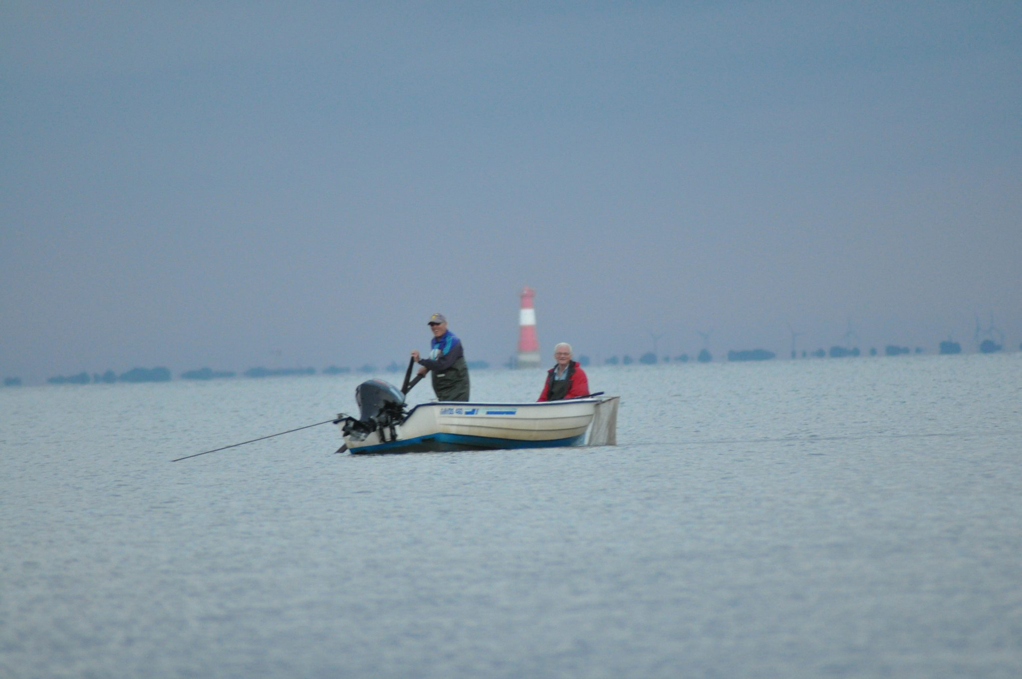 Granatfischer im Jadebusen -Wilhelmshaven (Banter Fischerdorf)